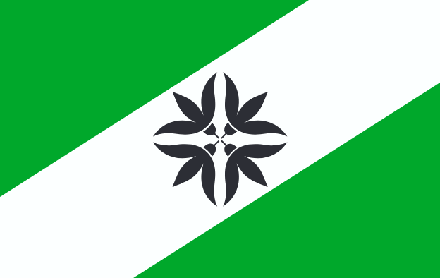 Lüganuse valla lipp 2018